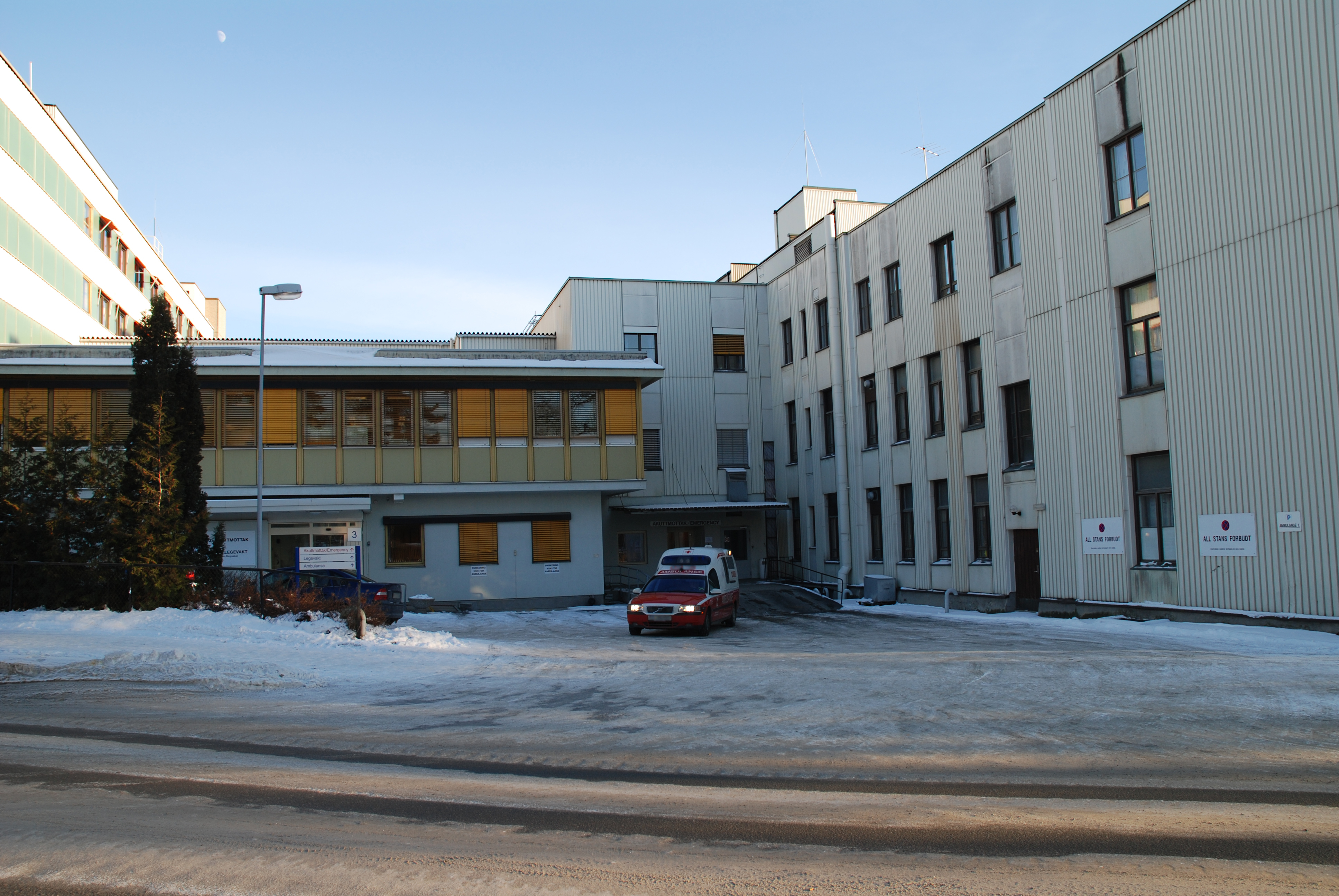 Hamar sykehus, in Hamar, Norway.